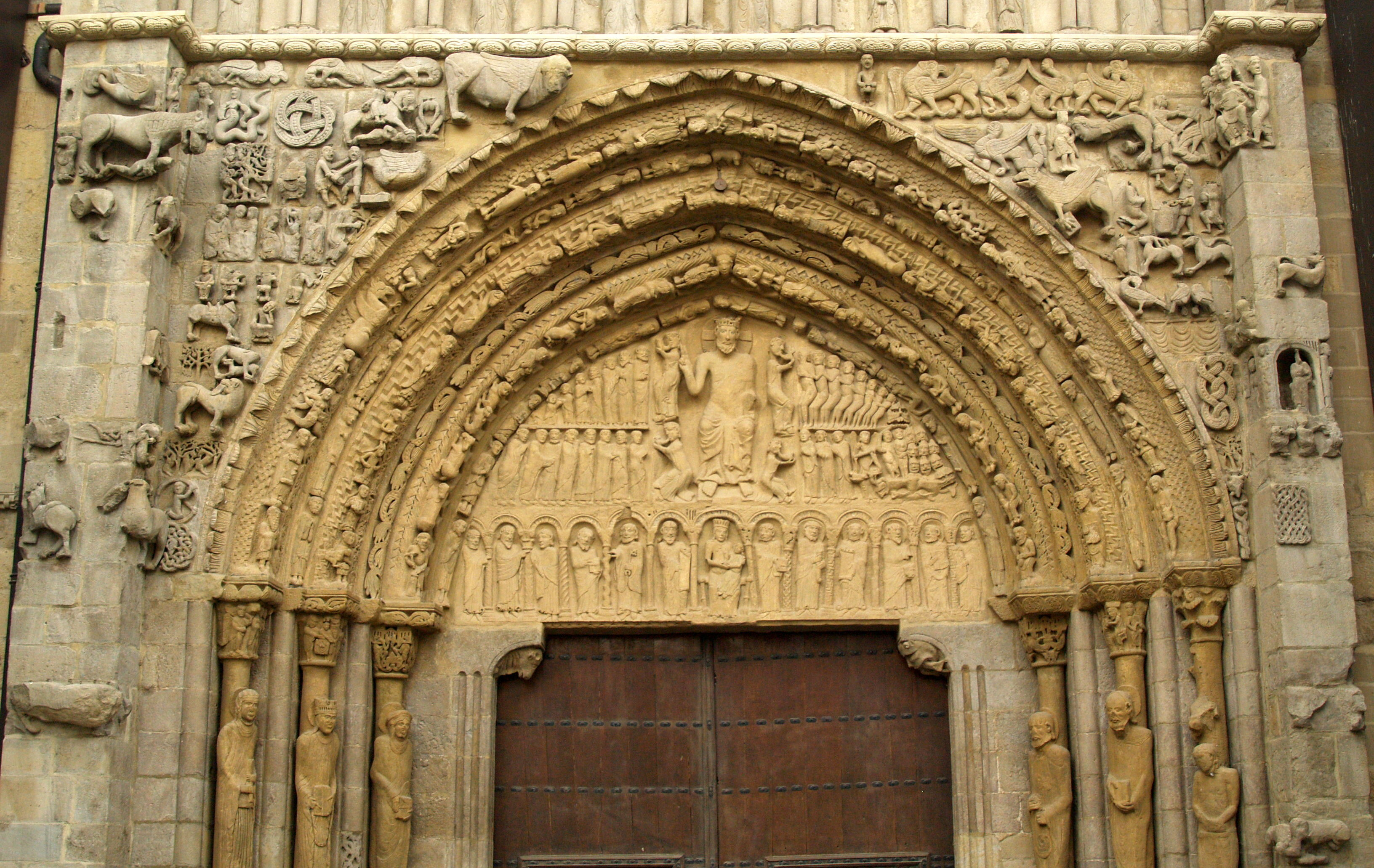 Sangüesa - Santa Maria la Real - Portada Sud S.XII-XIII